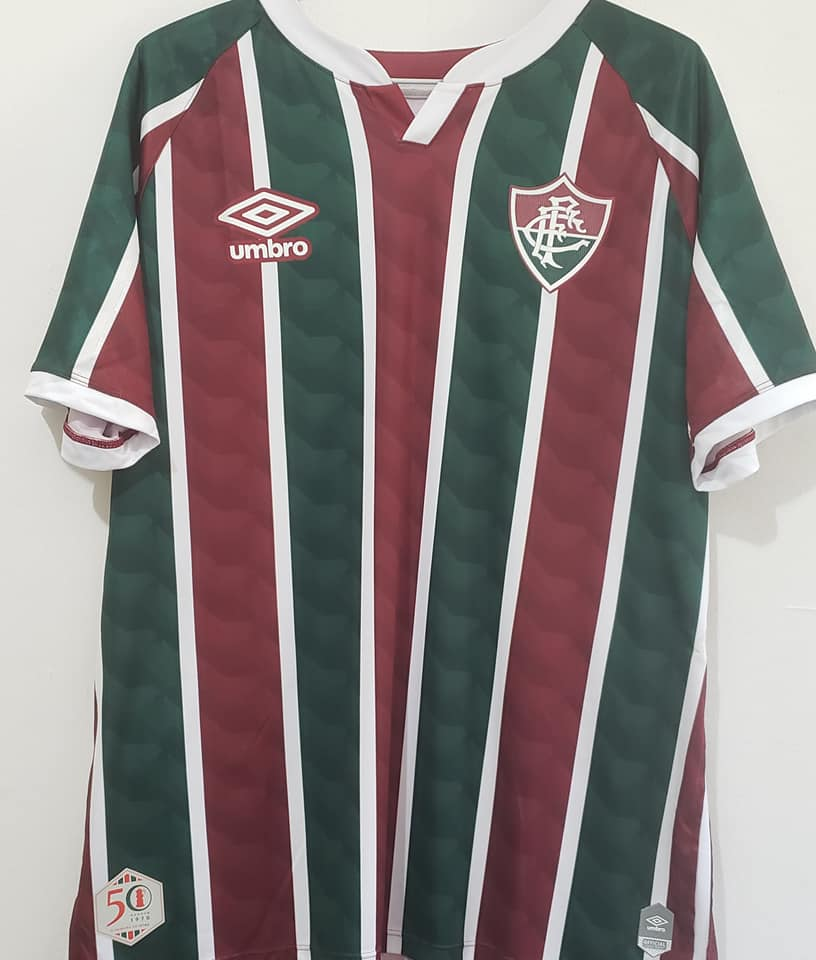 Camisa número 1 do Fluminense Football Club (Rio de Janeiro, Brasil) em 2020 fabricada pela Umbro. Os modelos 2020, lançados oficialmente em 6 de maio de 2020 através de Live na FluTV com o rapper Xamã, trazem um selo em homenagem aos 50 anos da conquista do Campeonato Brasileiro de 1970, o primeiro campeonato nacional conquistado pelo Fluminense.